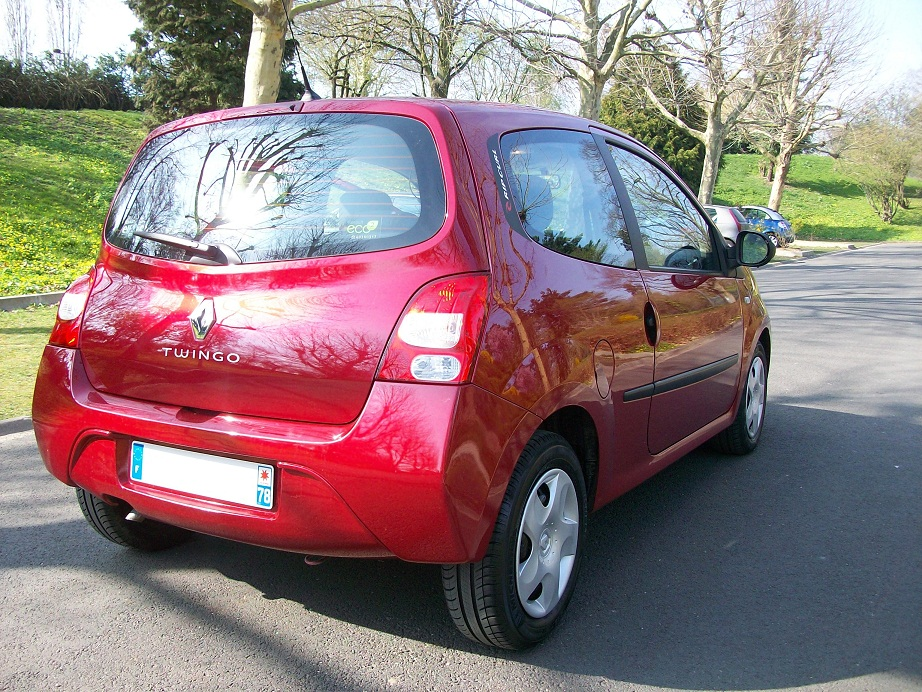 Twingo II